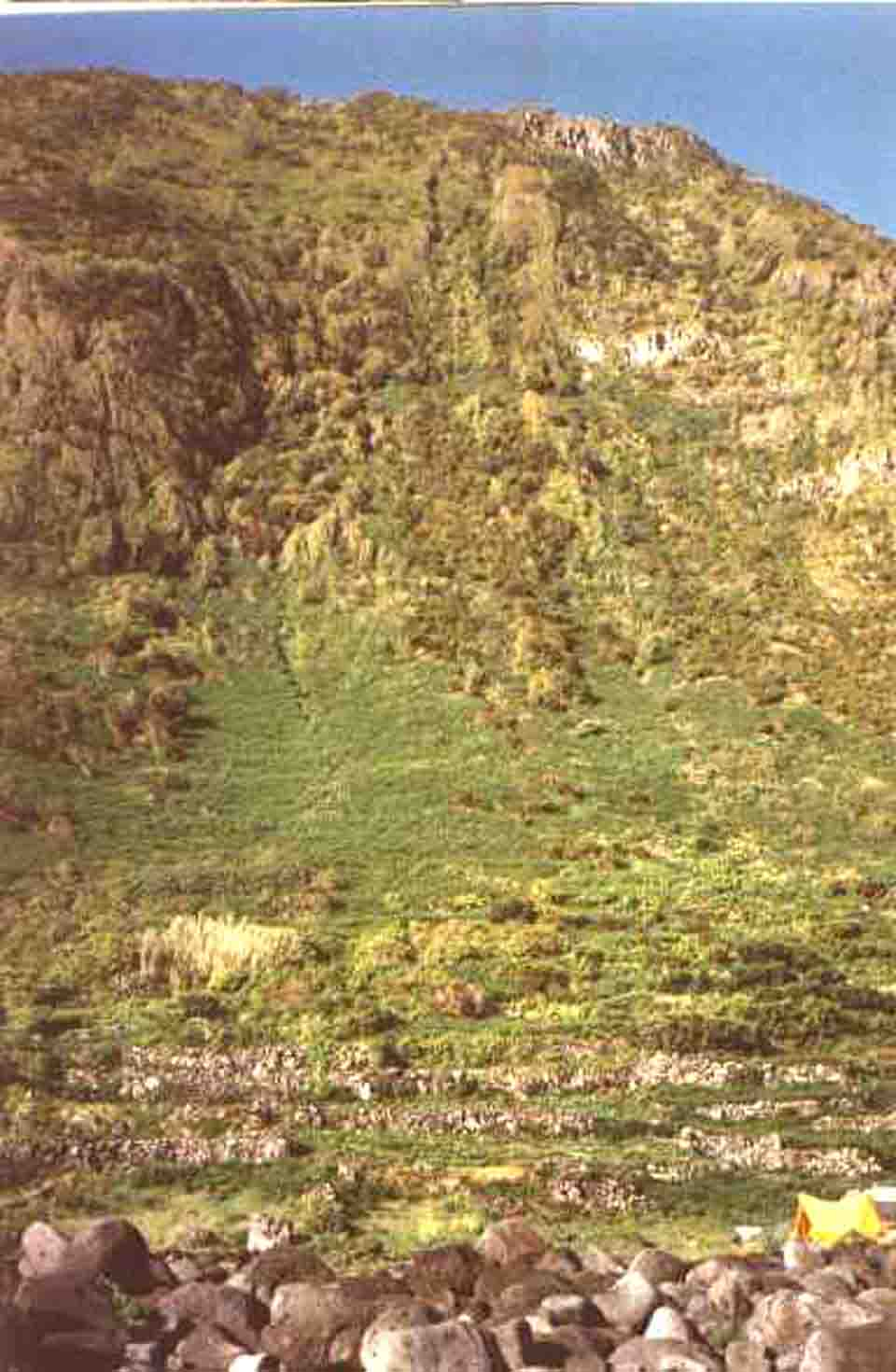 Fajã Rasa, Falésia da Costa Norte, ilha de são Jorge, Açores, Portugal.